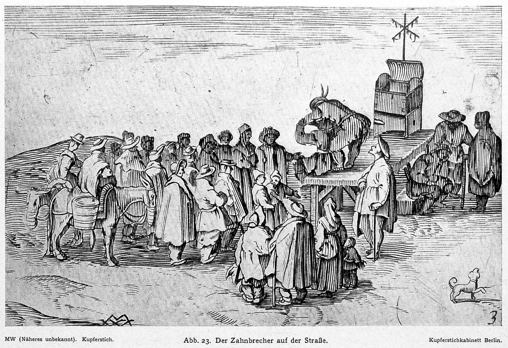 Der Zahnbrecher auf der Strasse. General Collections Keywords: Dentistry